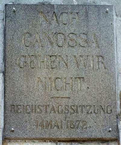 Canossasäule Bad Harzburg, Inschrifttafel "Nach Canossa gehen wir nicht - Reichstagssitzung 14. Mai 1872"